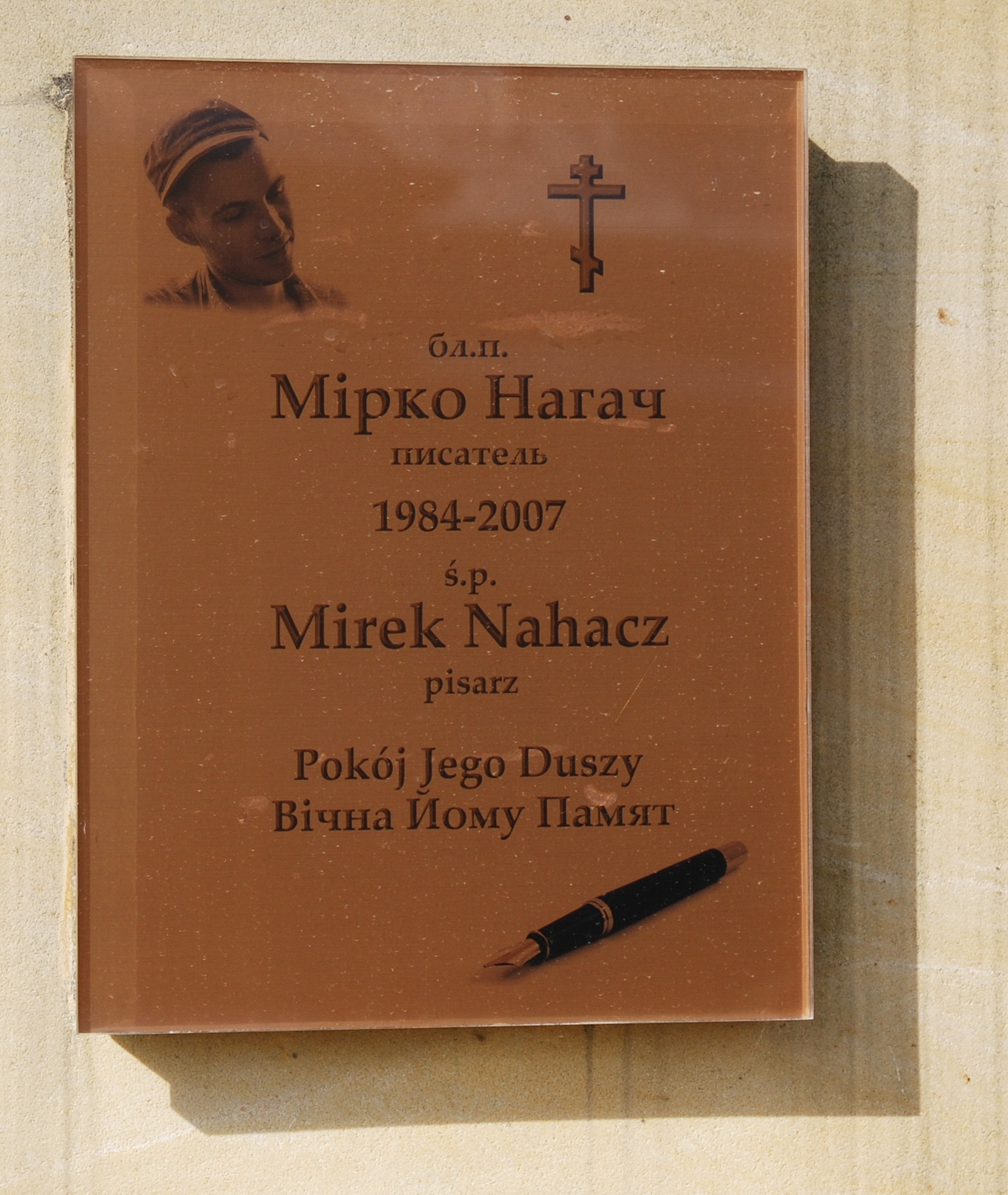 wieś Leszczyny